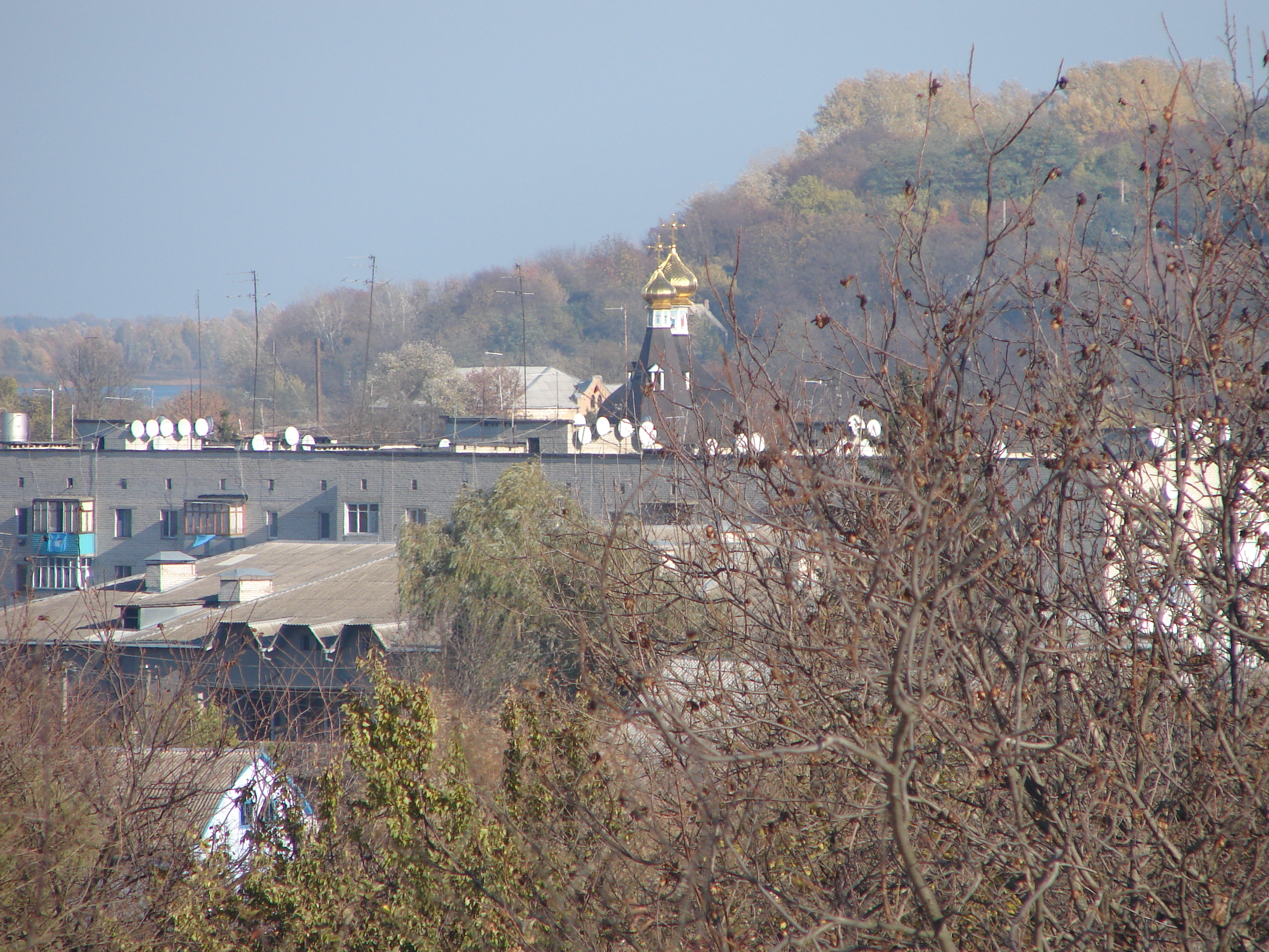 Ржищів. Троїцька церква.